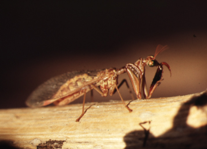 Mantispa pagana nettoyant ses pattes ravisseuses Photo Salvator, Dabisse, Les Mées, Alpes de Haute Provence, France, 1984 Christian Pinatel 1984